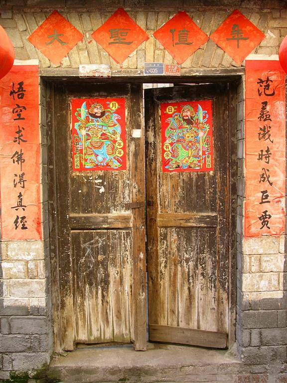 Foto: Tor Svensson Fenghuang, Kina